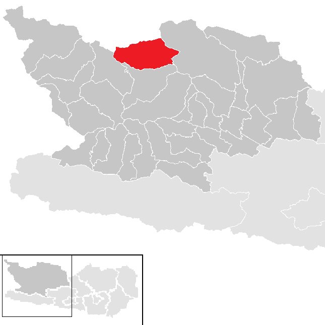 Bezirk Spittal an der Drau